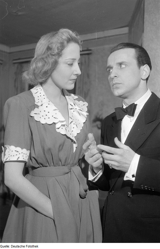 Original image description from the Deutsche Fotothek Szenenbilder